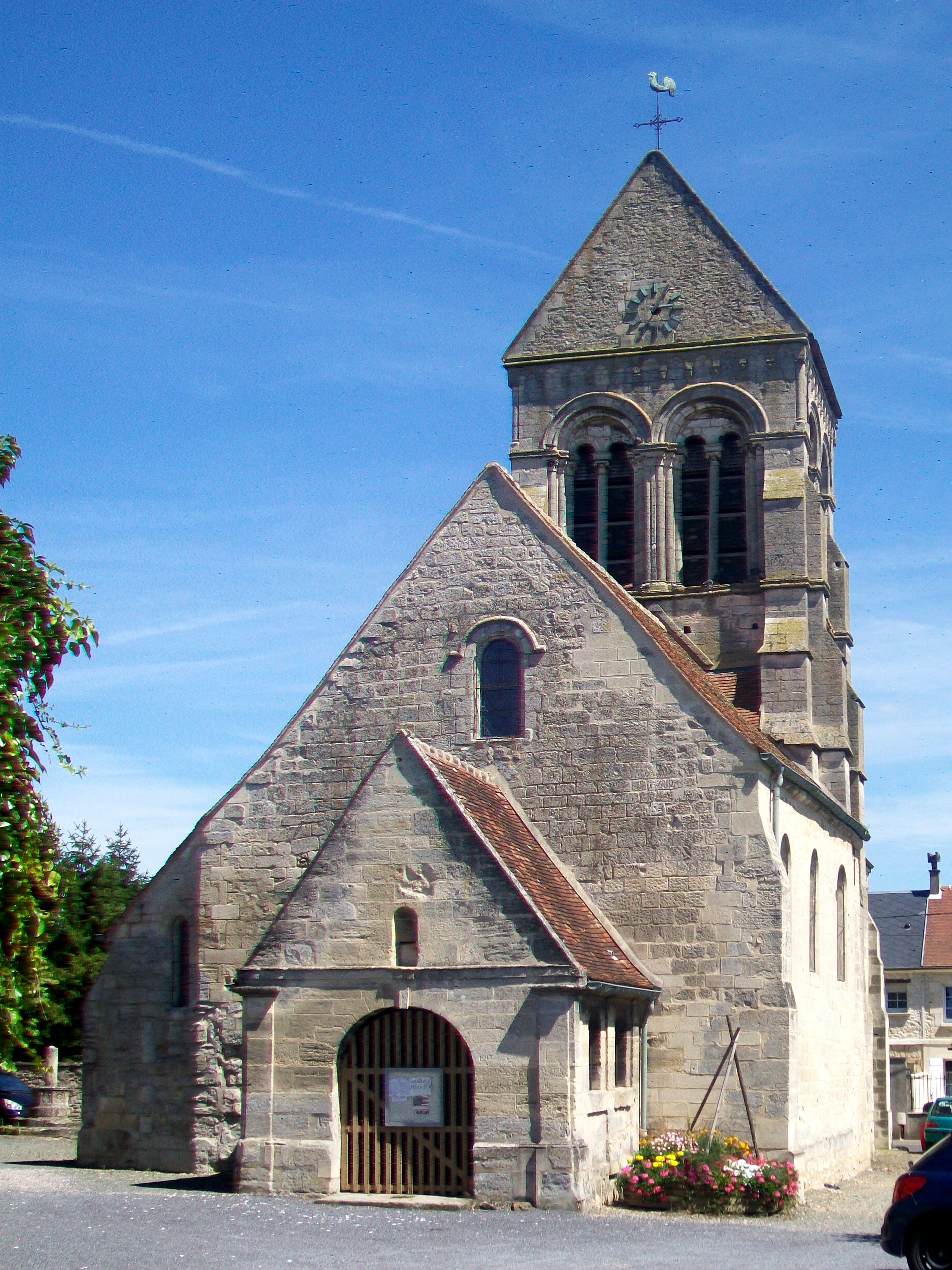 Façade occidentale de l'église Saint-Aubin.